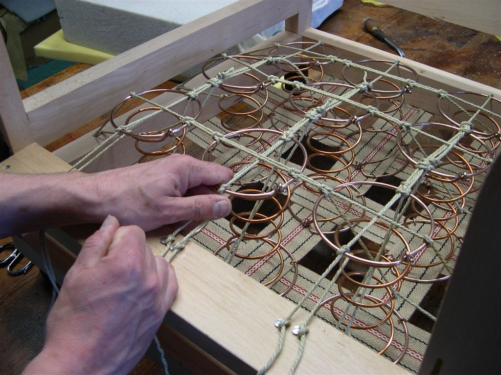 Polsterei: so wird klassisch gearbeitet